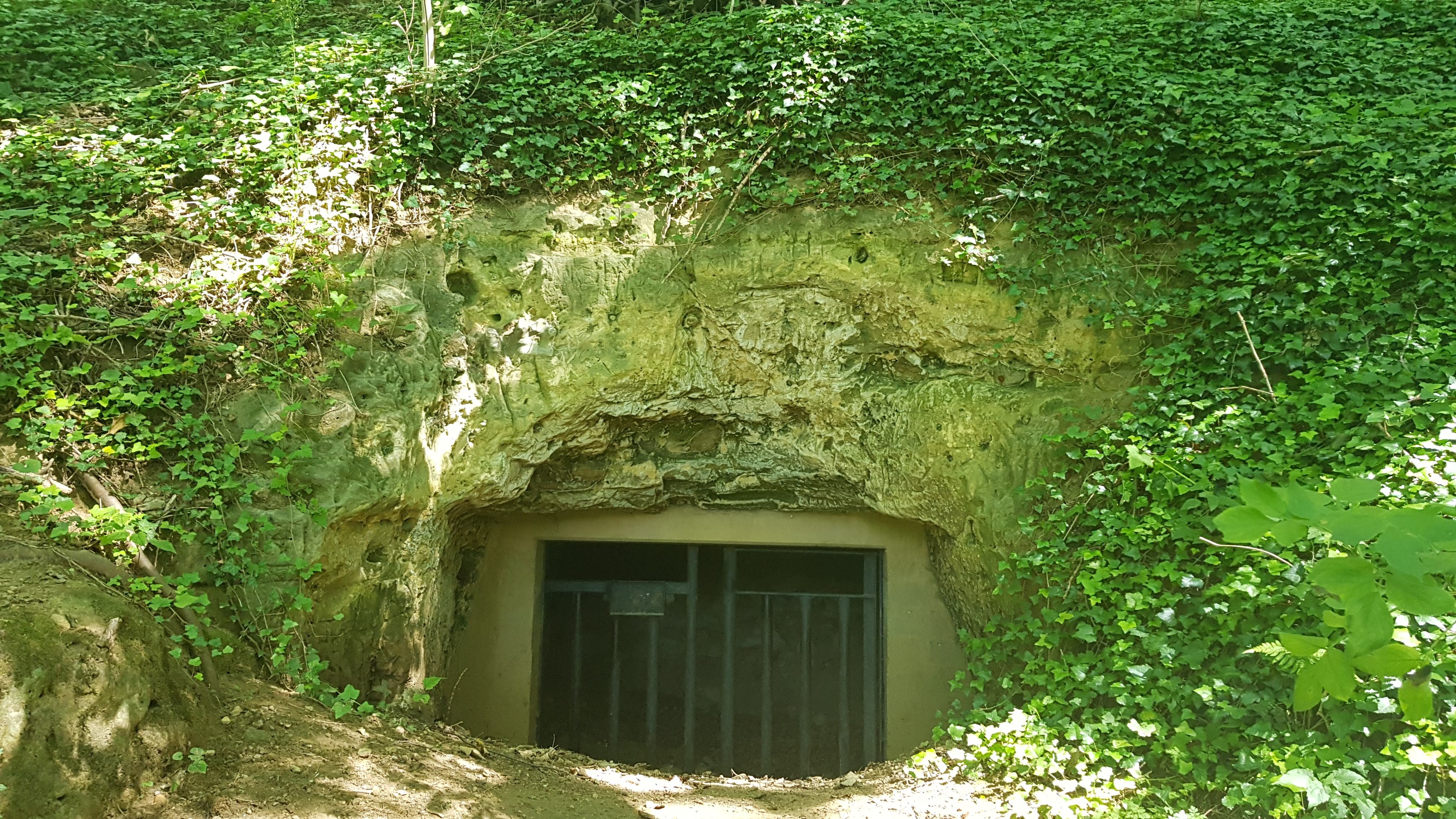 Heiberggroeve, Valkenburg, Nederland